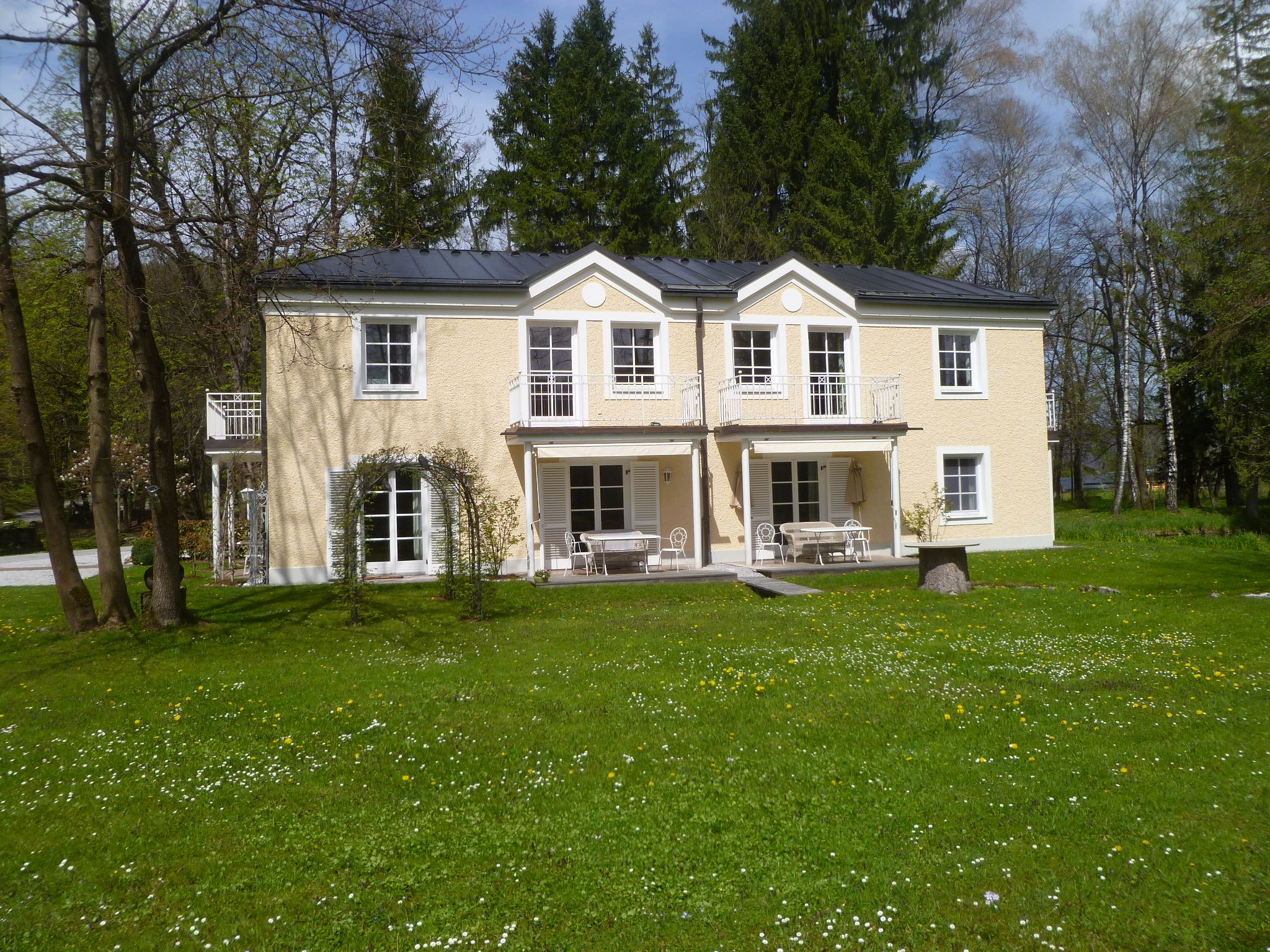 Hotel Restaurant Maria Theresien-Schlössl